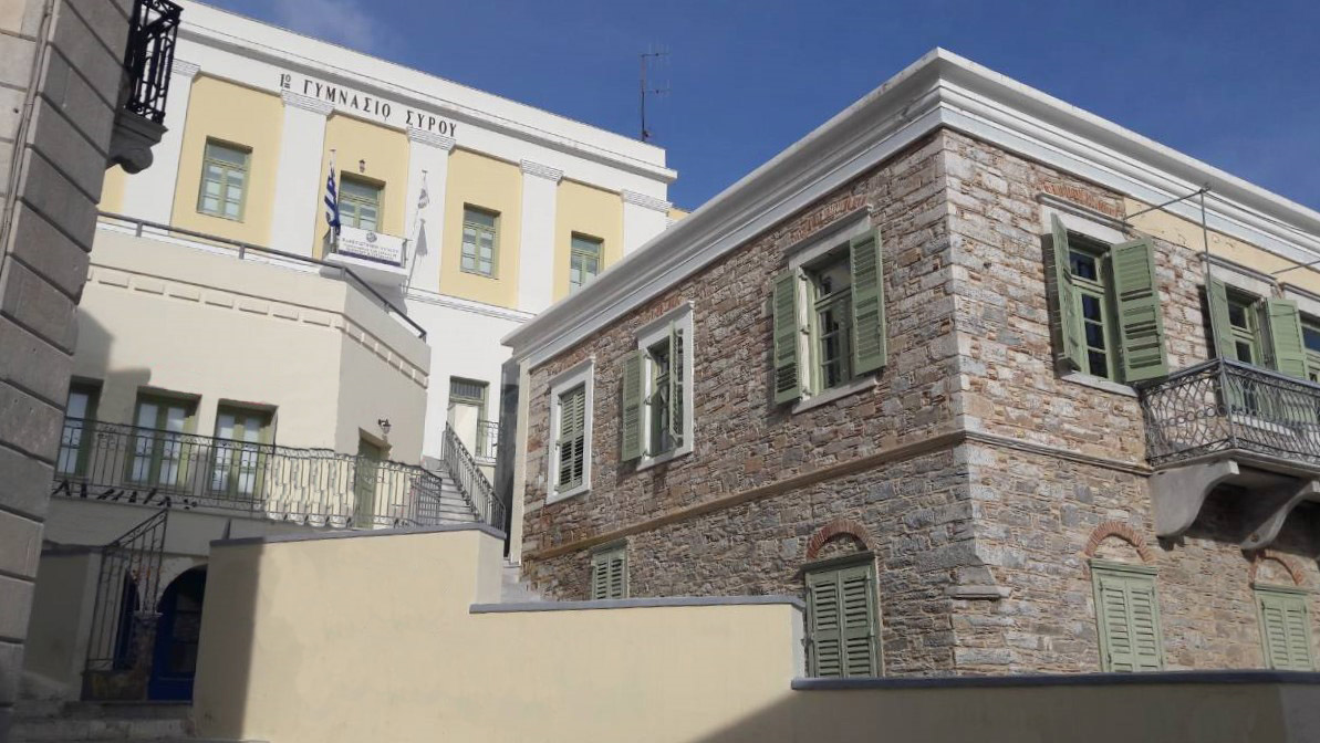 Τα κεντρικά κτίρια του τμήματος στεγάζουν αίθουσες διαλέξεων, εργαστήρια Η/Υ, γραφεία καθηγητών και αίθουσες συνεδριάσεων.